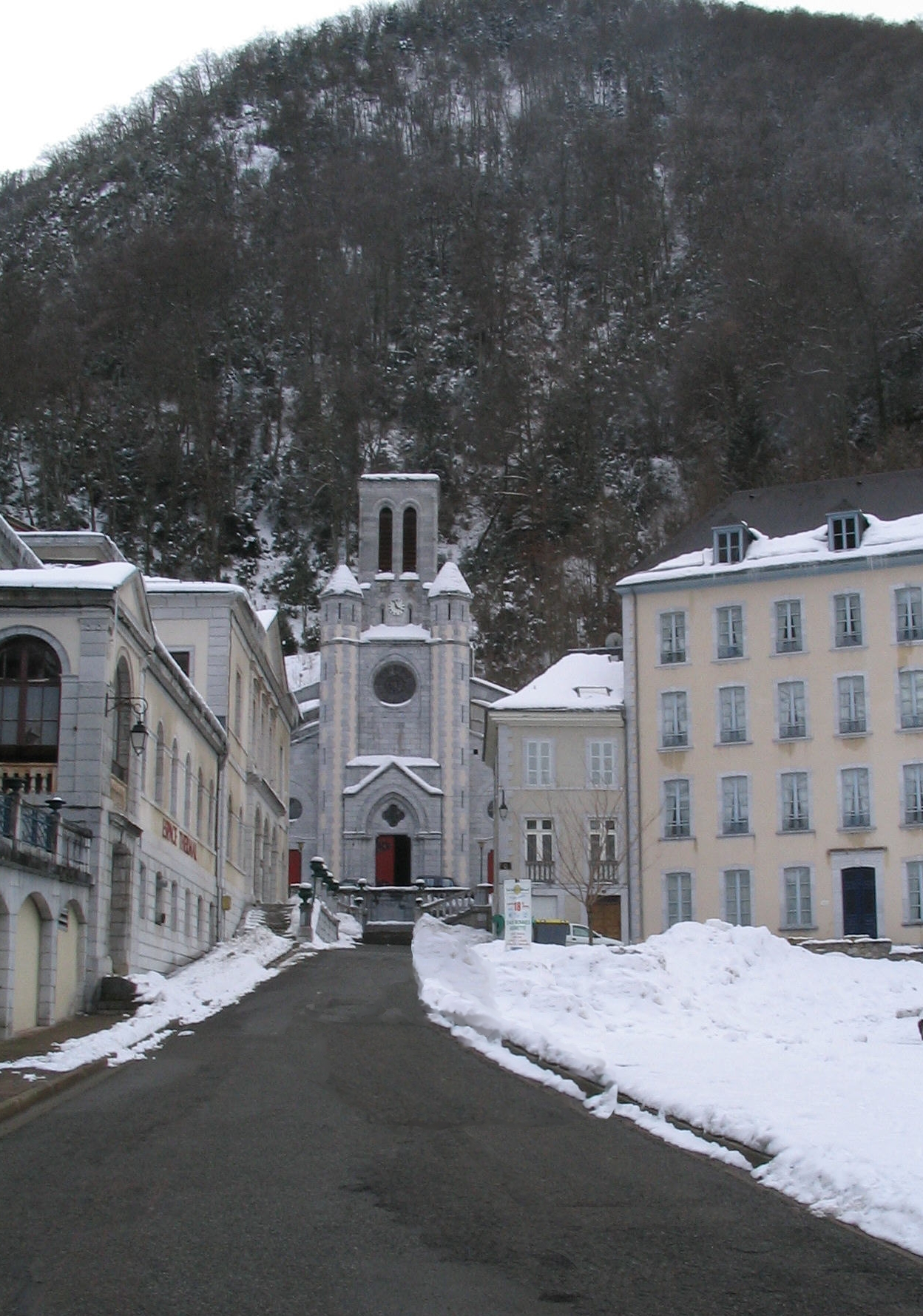 Eglise des Eaux-Bonnes (64) Auteur: P Charpiat- 2004